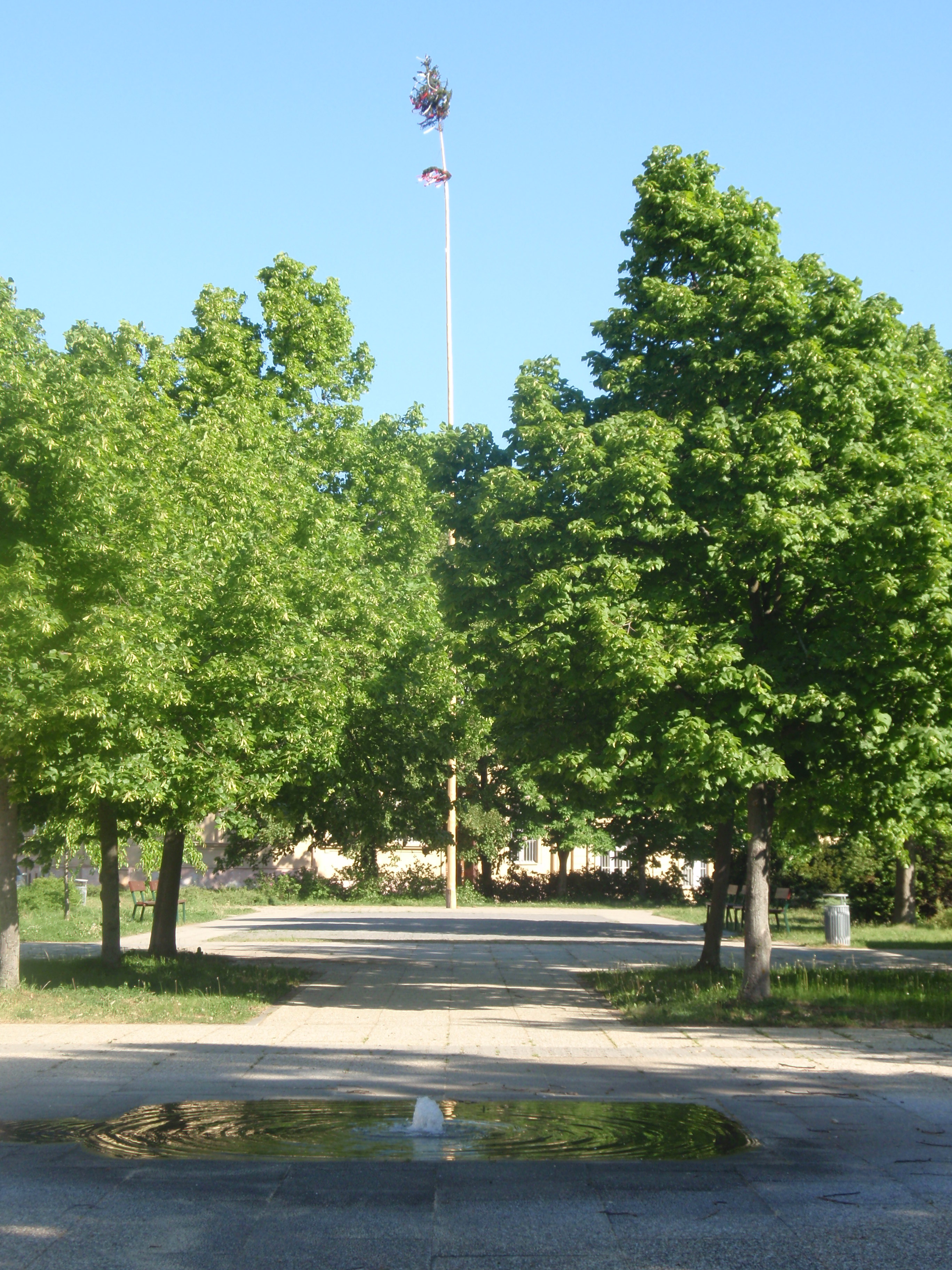 Náměstí Svobody, vodní prvek, vodotrysk, postavená májka (25 m)